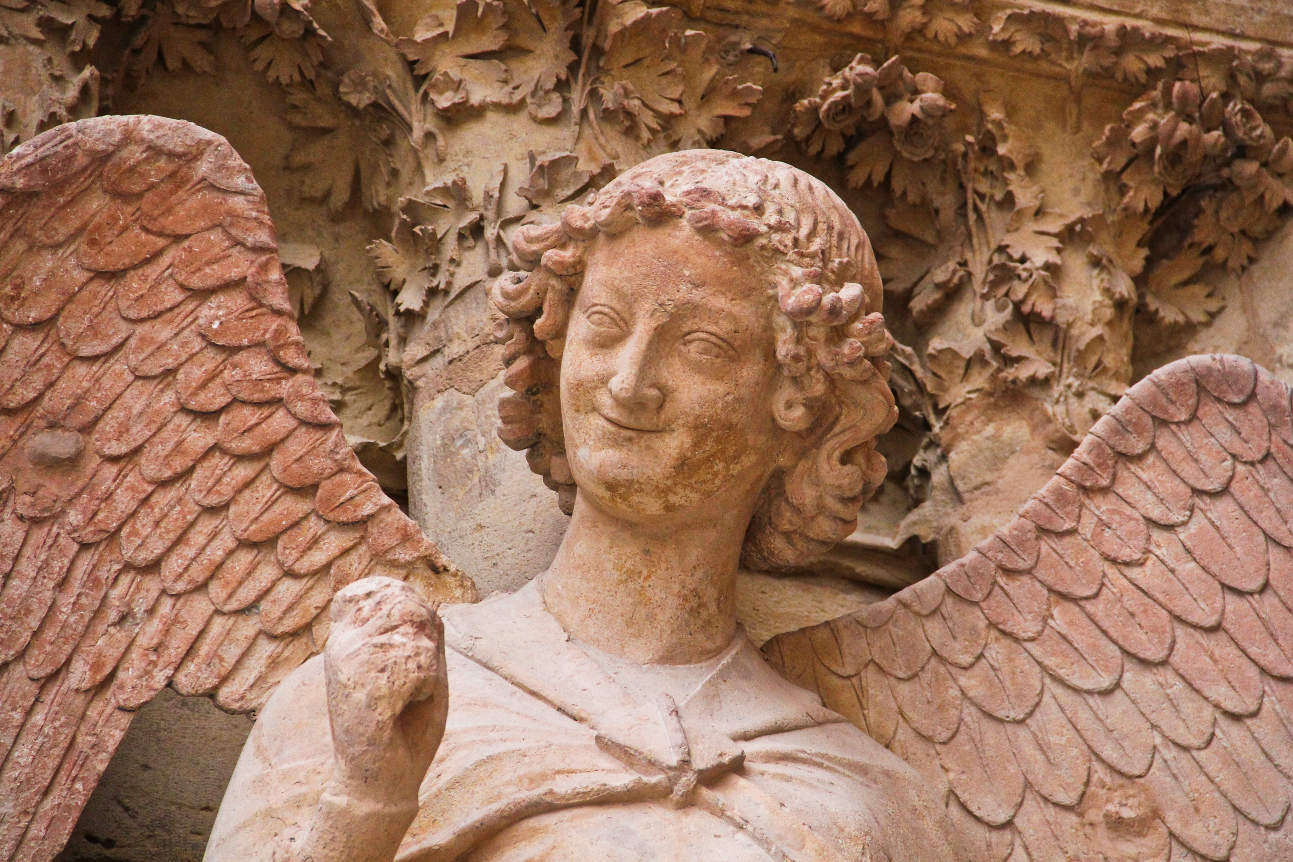 photographie de l' ANGE AU SOURIRE, statue présente sur la Cathédrale de Reims, France